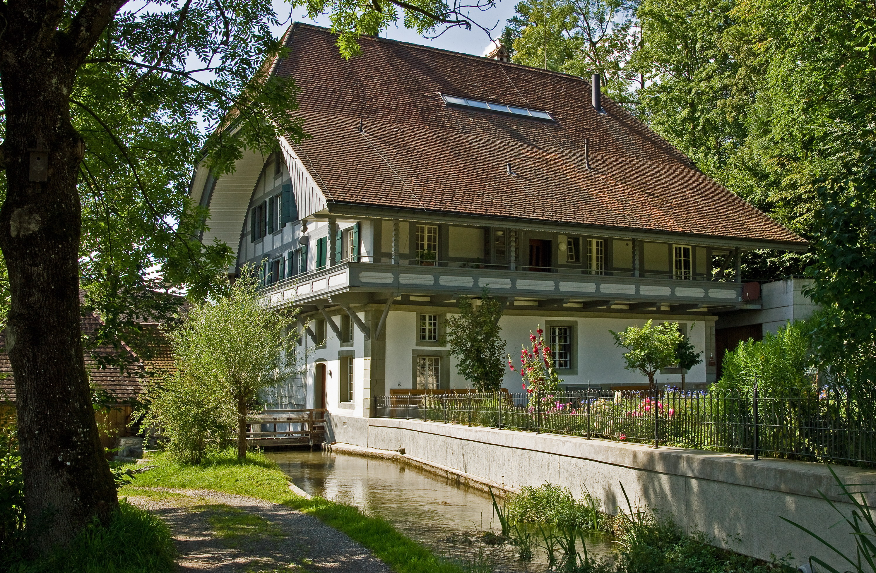 Kulturmühle Lützelflüh, bis 1970 als eine der schönsten Mühlenbauten in Betrieb, seither Kultur- und Begegnungsstätte